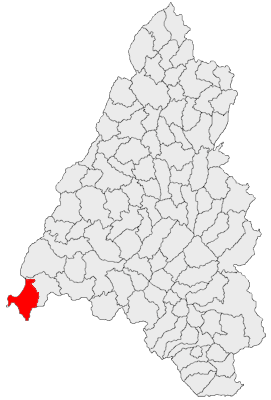 Categorie:Hărţi ale judeţului Bihor